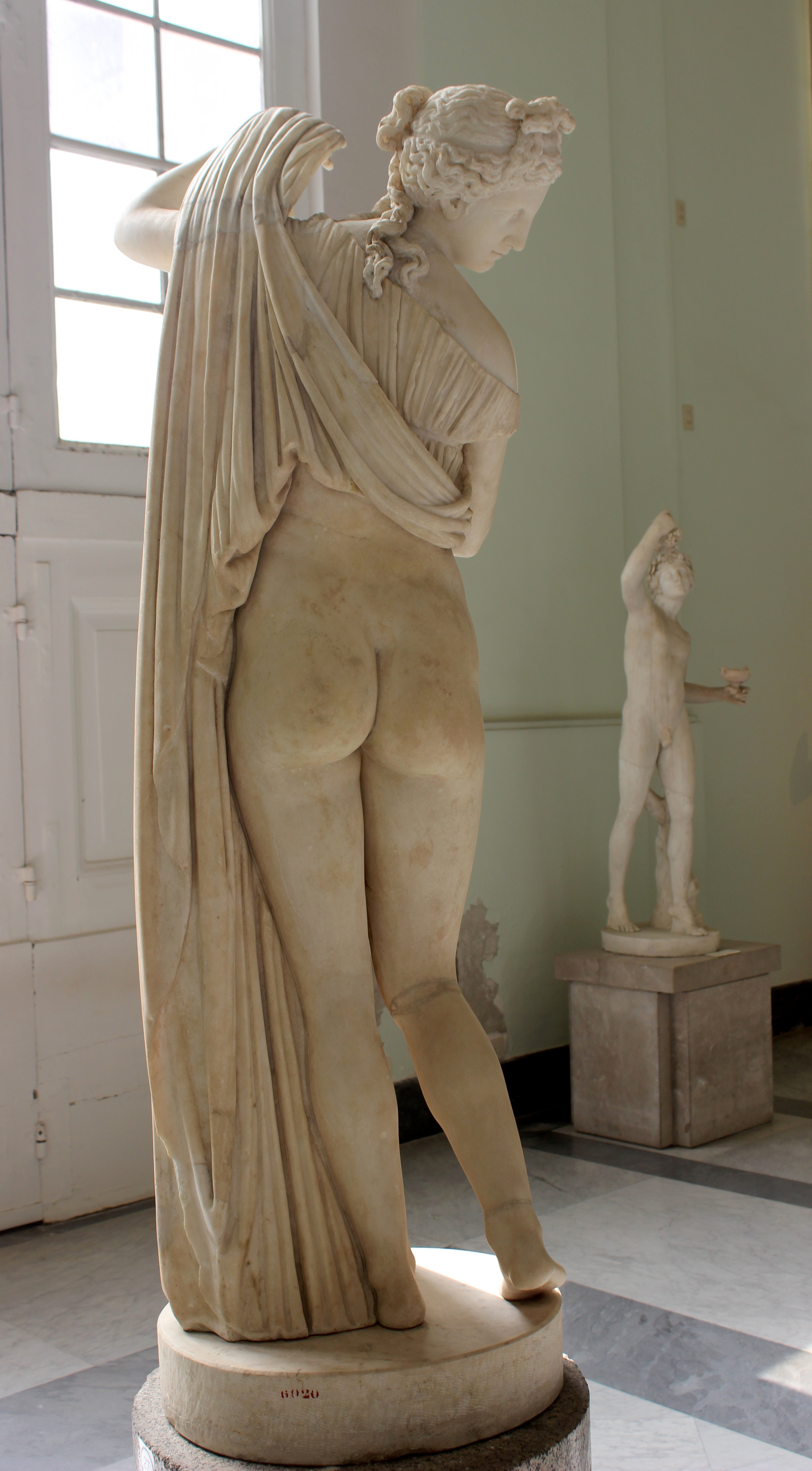 Nápoles, Museo Arqueológico Nacional. Afrodita Kallipyge.